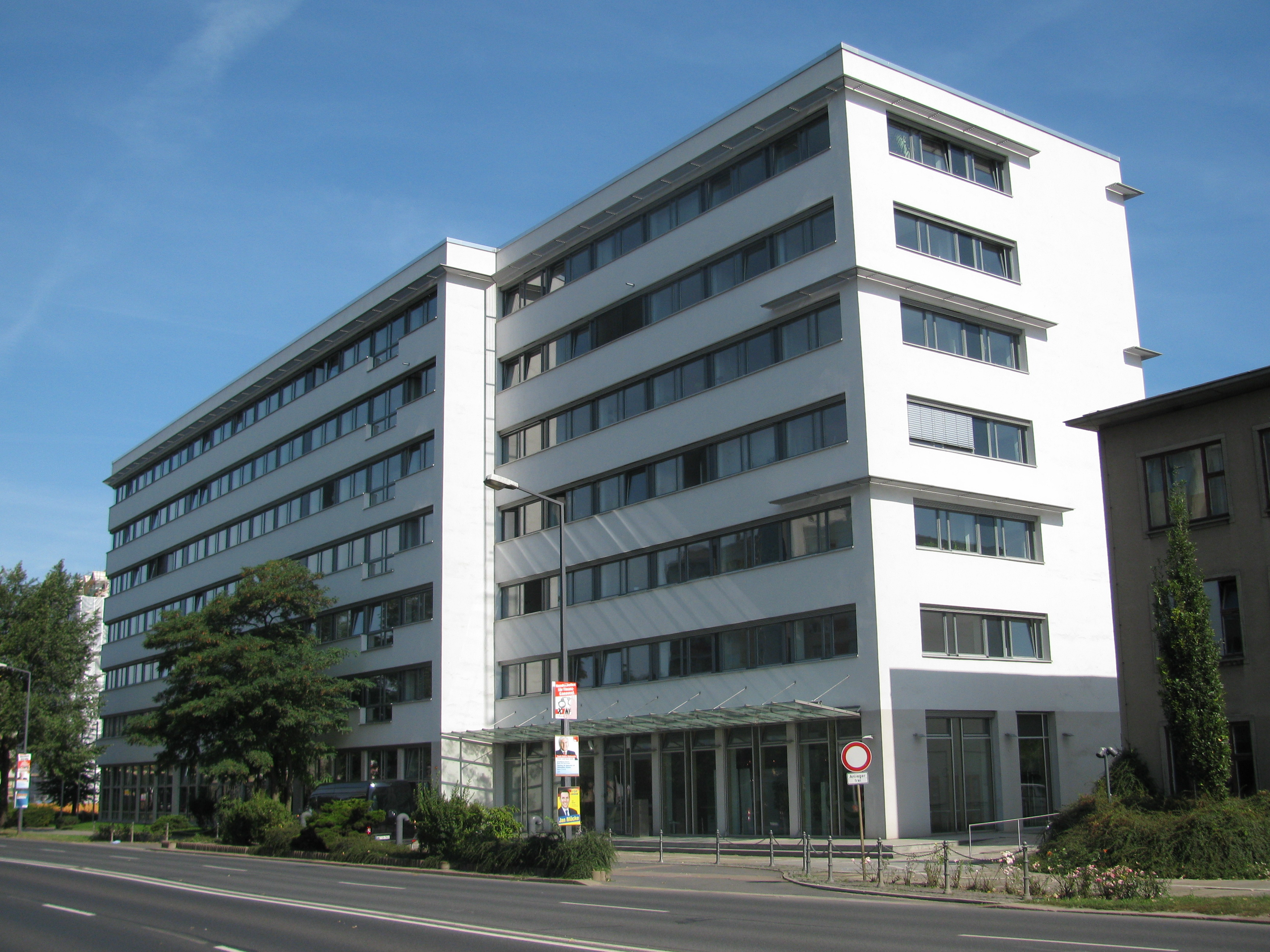 Albertstraße, Dresden, Stadtteil Innere Neustadt. Sächsisches Staatsministerium für Soziales (Sozialministerium Sachsen).